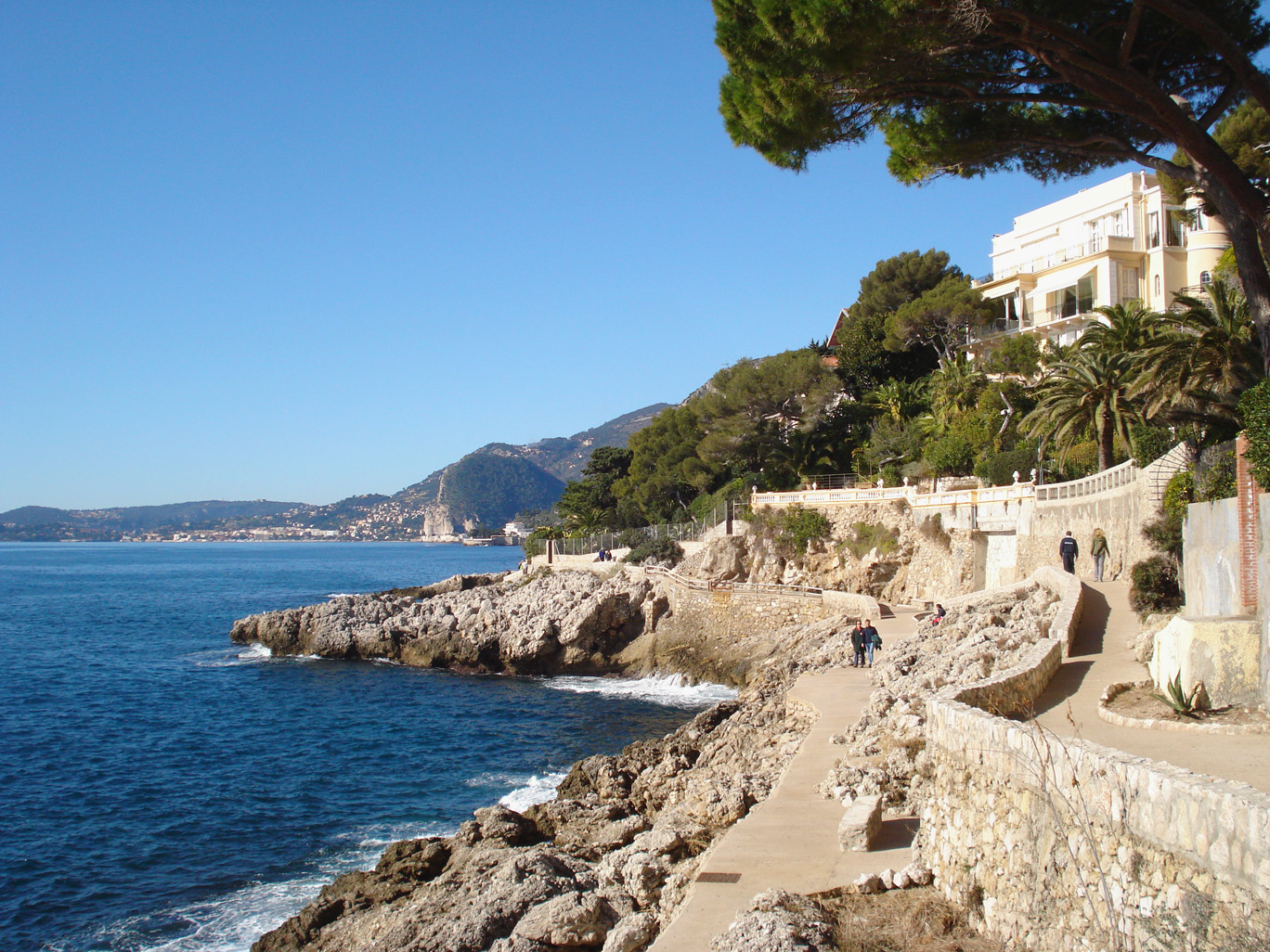 Sentier littoral à Cap d'Ail, près de Monaco en France